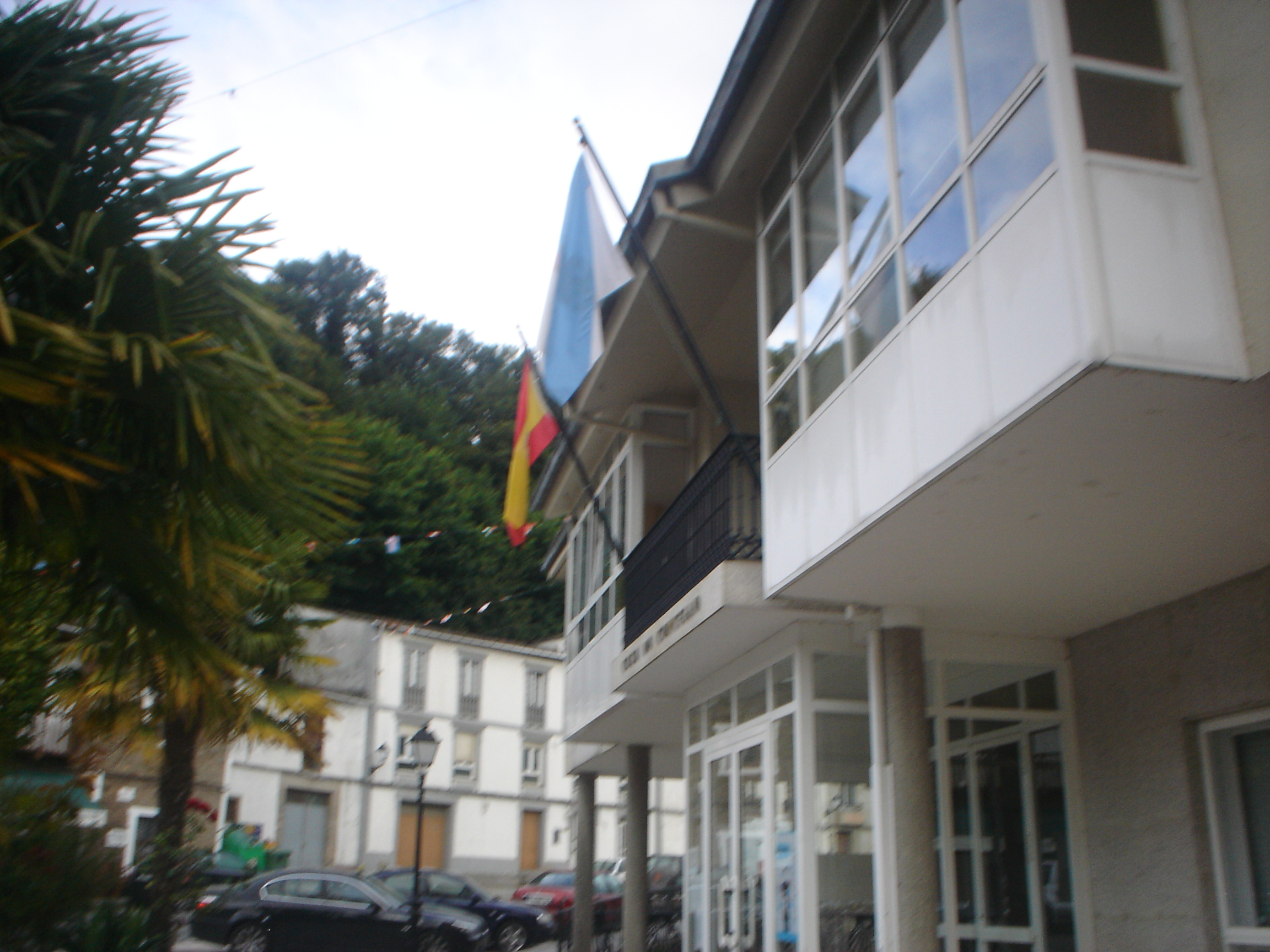 Ajuntament de Samos, a Lugo, Galícia